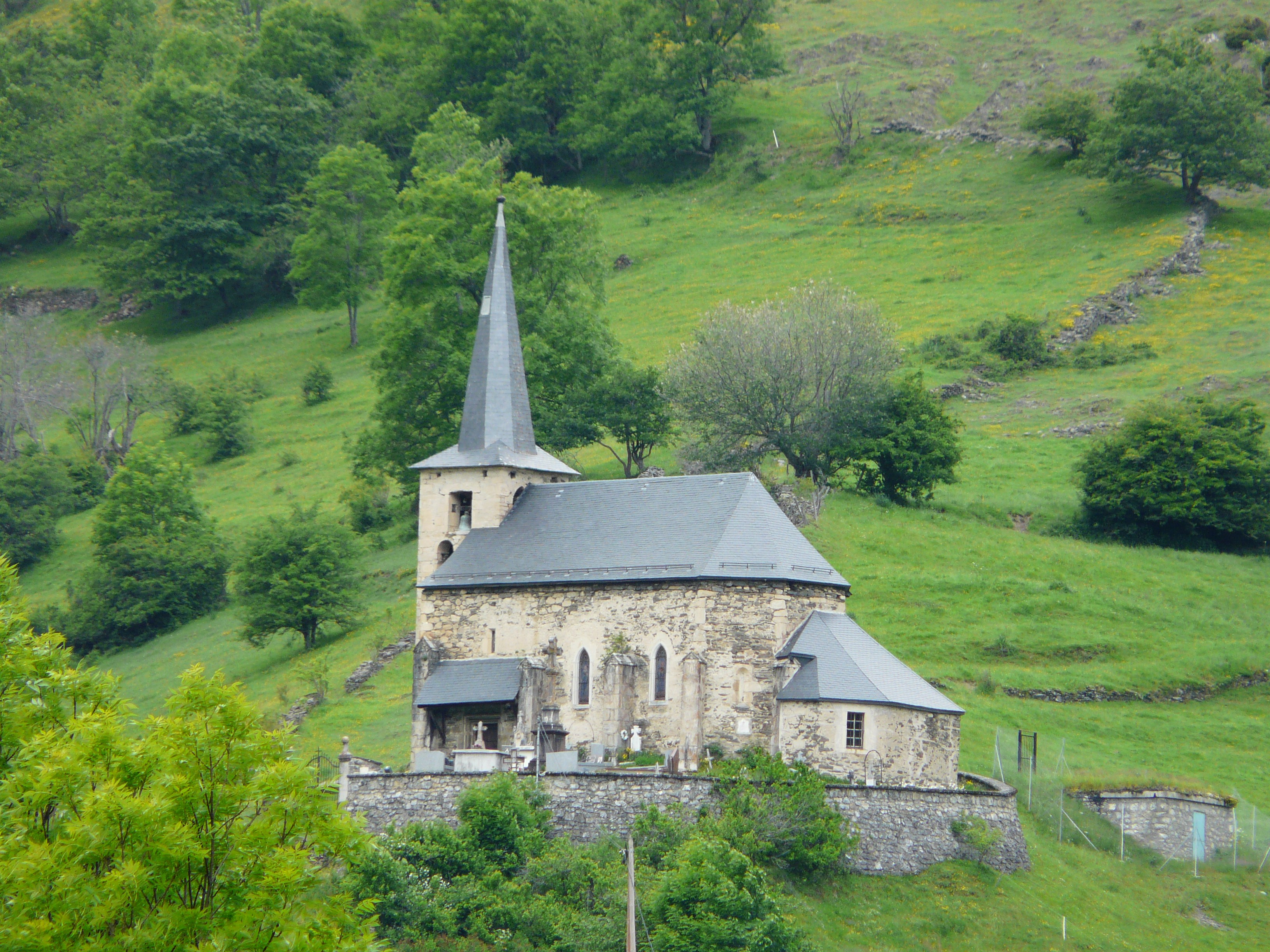 L'église Nativité-de-la-Sainte-Vierge de Cirès vue depuis le sud-est, Haute-Garonne, France.